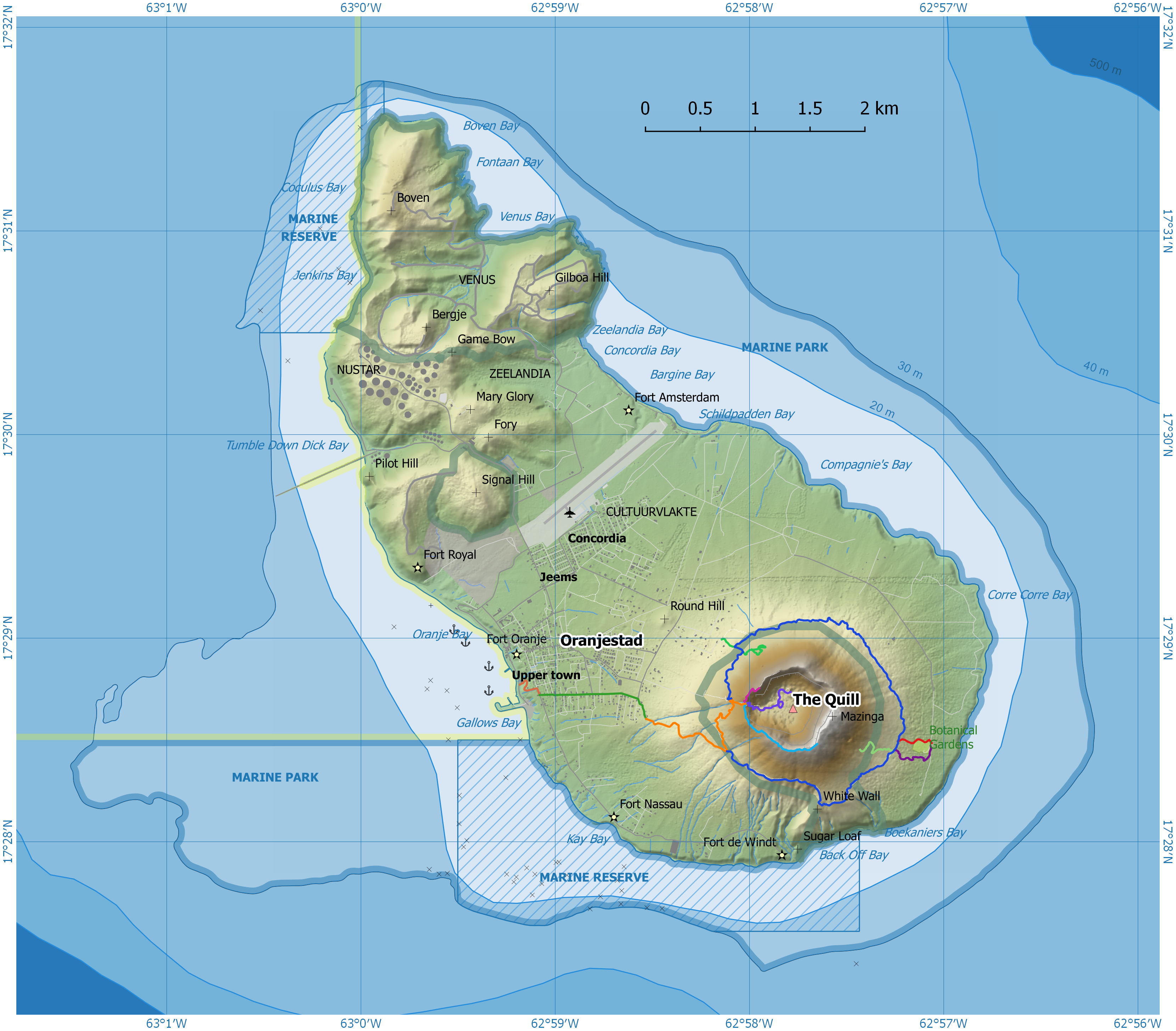 STENAPA parken en marine reservaat Sint Eustatius This map may be incomplete, and may contain errors. Don't rely solely on it for navigation.